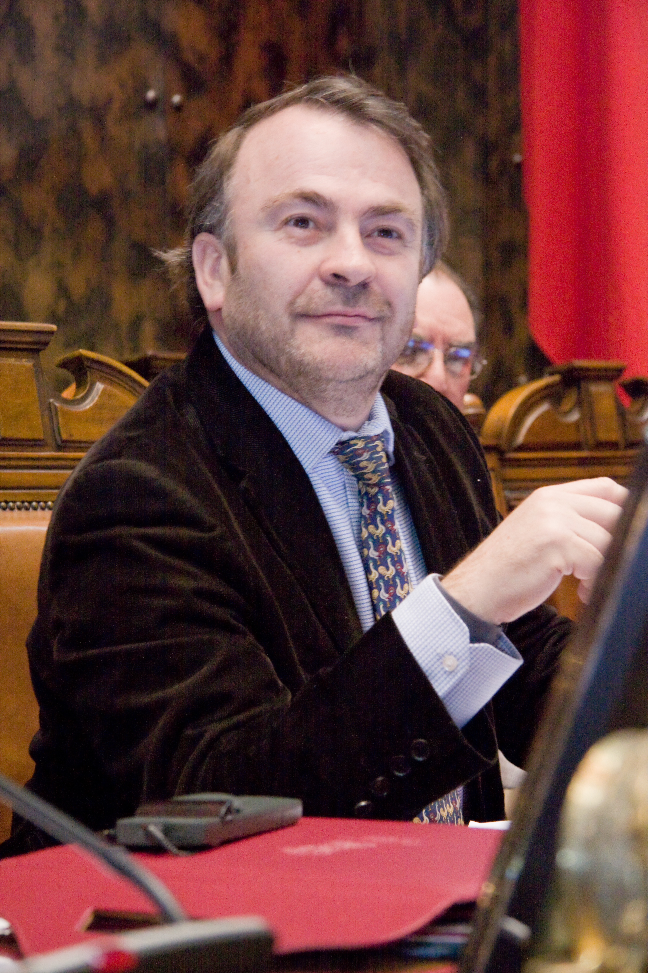 El diputado Pepe Auth, moderador de la mesa.